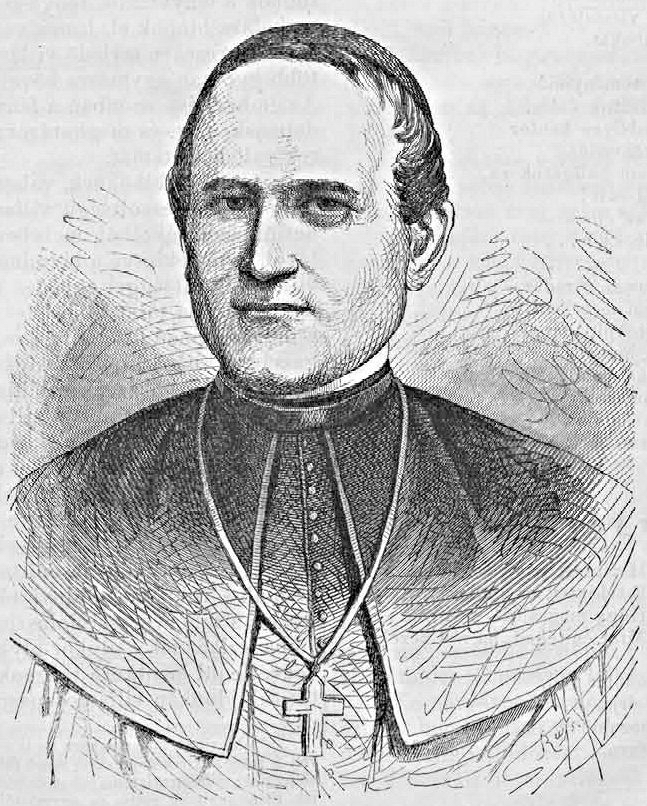 Simor János (1813–1891) győri püspök, bíboros, hercegprímás, esztergomi érsek (Vasárnapi Ujság, 1862. június 29.)